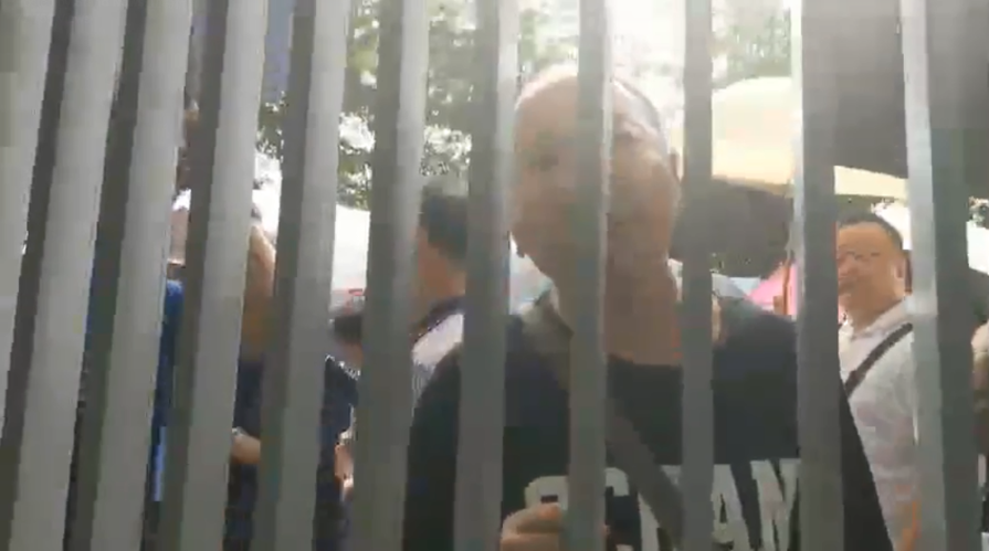 2019年6月30日「撐警隊、護法治、保安寧」集會後，立法會示威區現場